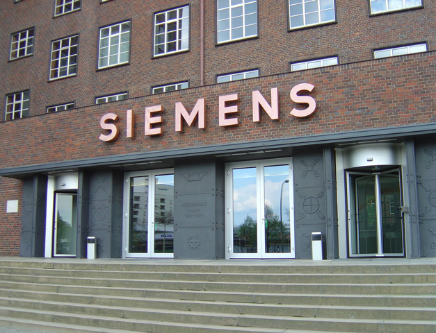 The entrance of the SIemens Wernerwerk, Siemensstadt, Berlin, Germany